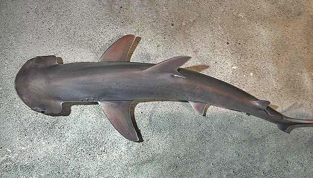 Sphyrna tiburo (Atlanta aquarium)